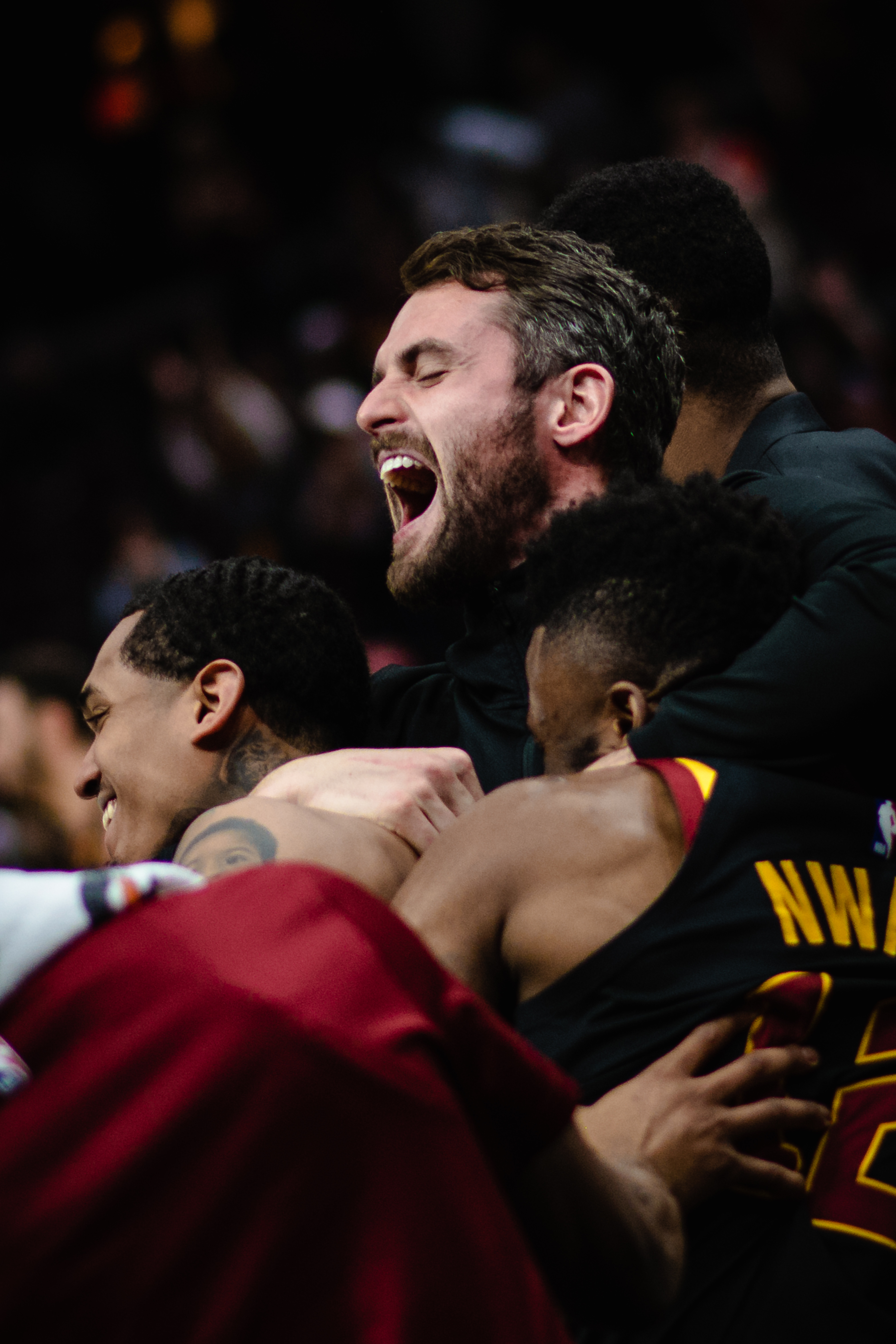 Kevin Love